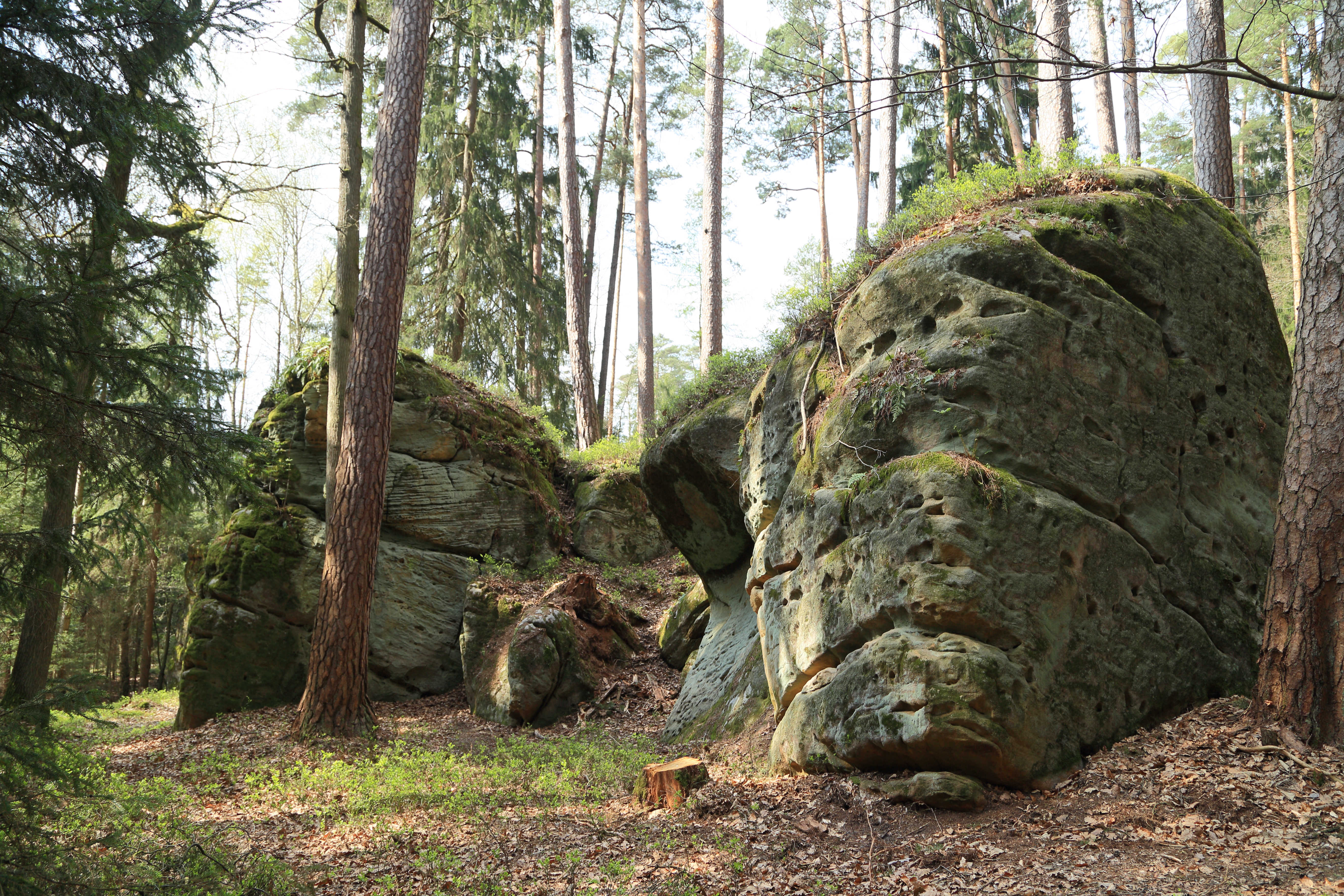 Felsengruppe Philippstein E von Eckersdorf Geotop-Nummer: 472R029 6035GT000013 Eckersdorf Bayreuth 6035 Bayreuth R: 4465483 H: 5532775 370 m ü.NN L: 40 m, B: 20 m, H: 20 m, F: 800 qm Obermain-Bruchschollenland Die fein- bis mittelsandige, gelbliche Felsgruppe im Lias Alpha 1 und 2 besteht aus mehreren freistehenden Blöcken.